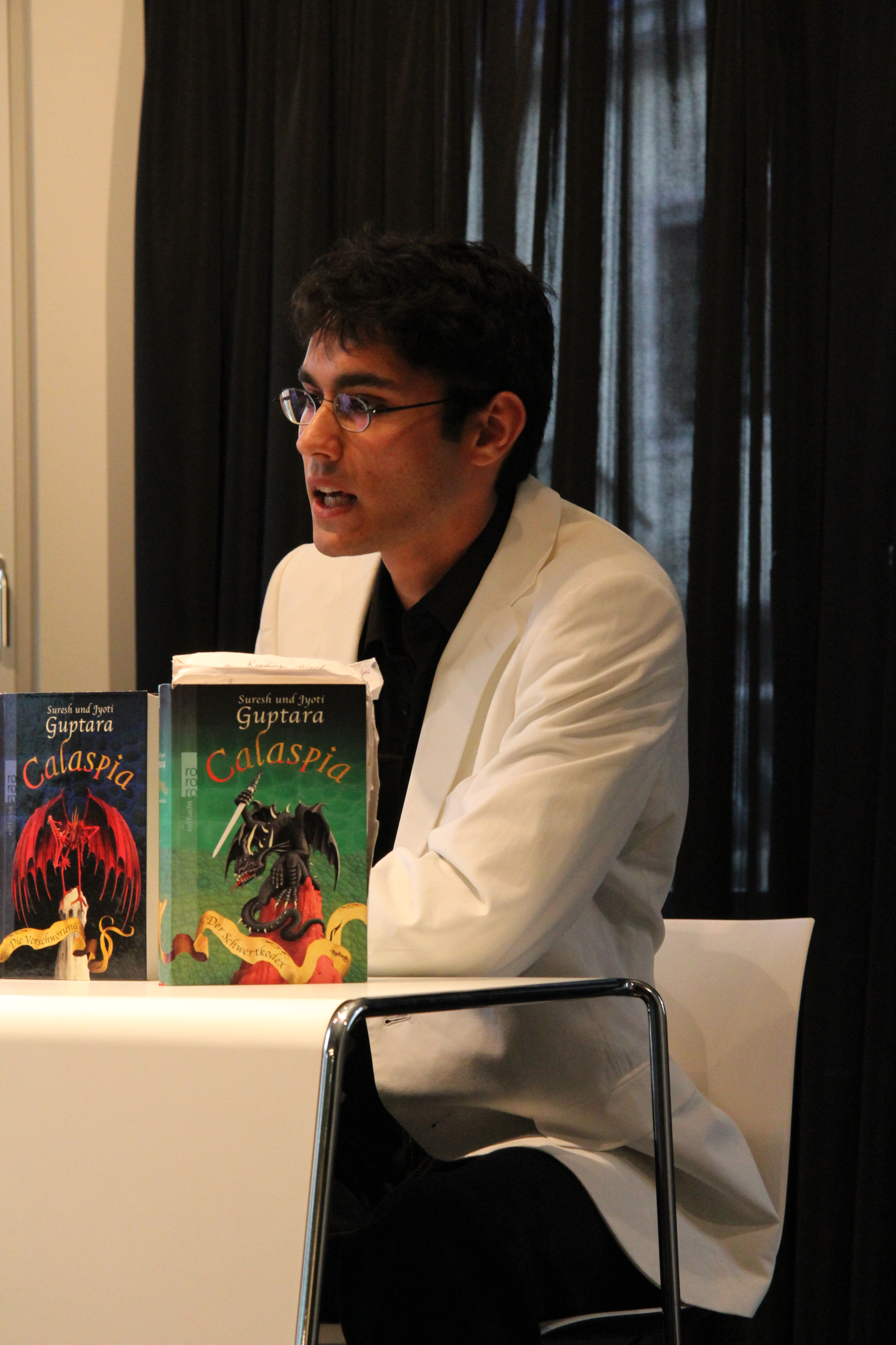 Guptara (Autor) bei Buchvorlesung hochgeladen durch